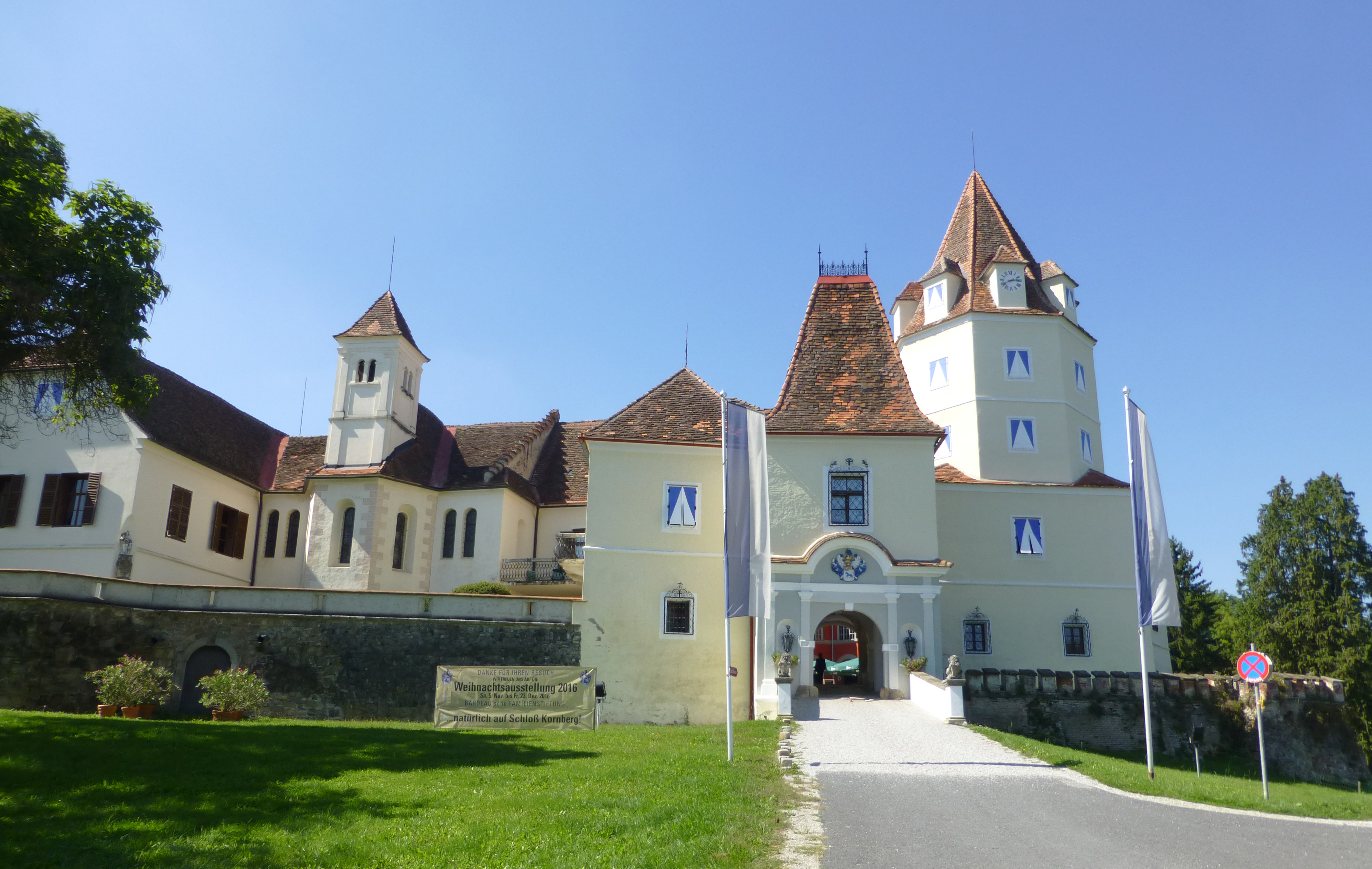 Vue extérieure du château Kornberg, près de Feldbach, Styrie. Accessible comme restaurant.